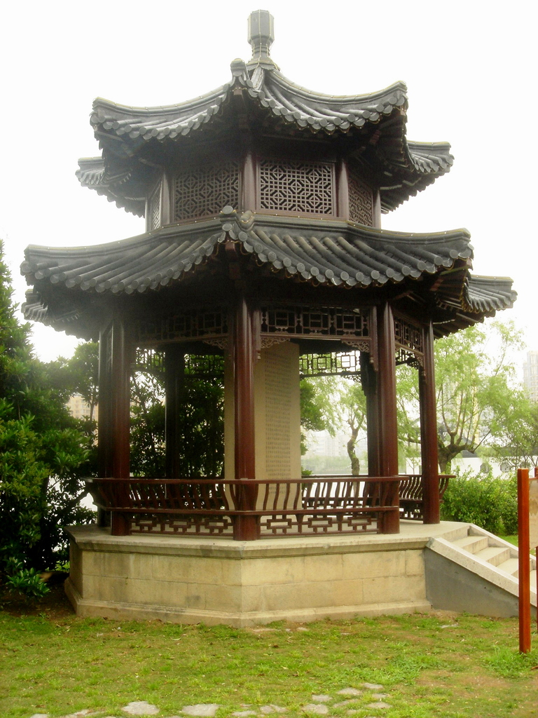 莫愁湖邹鲁碑亭